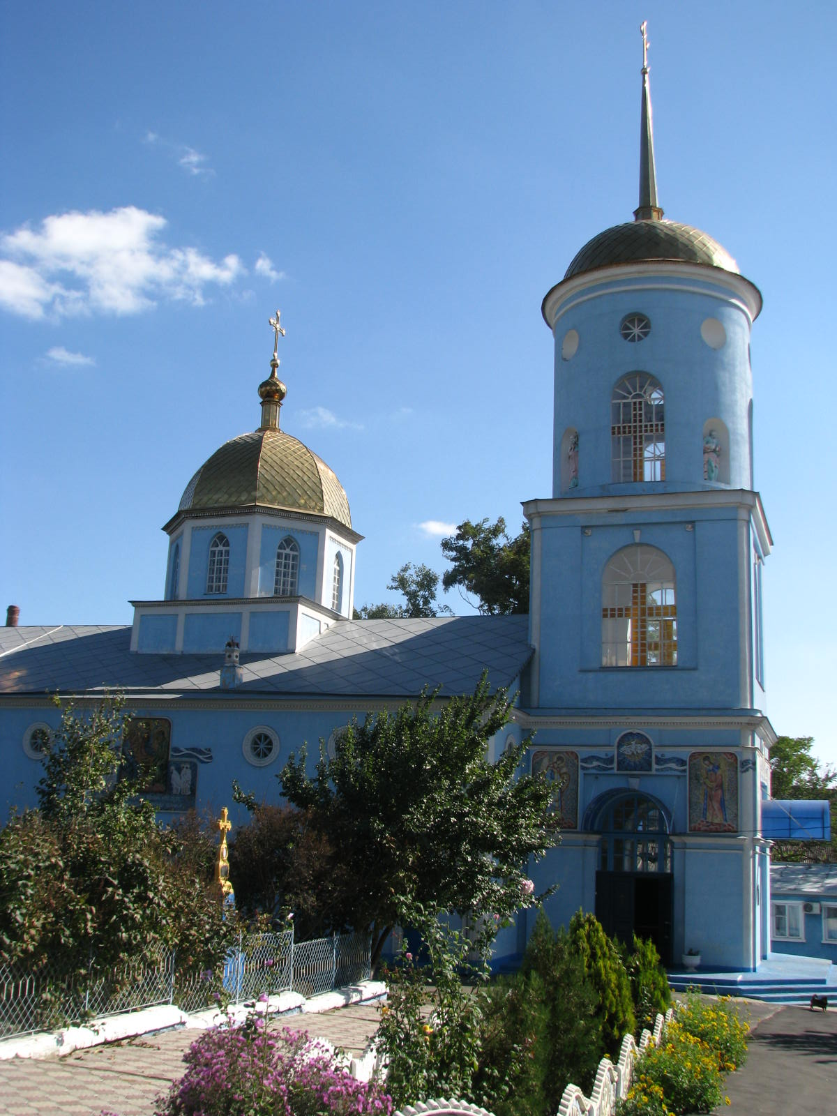 Греко-Софіївська церква (мур.), Херсон, Червонофлотська вул., 13